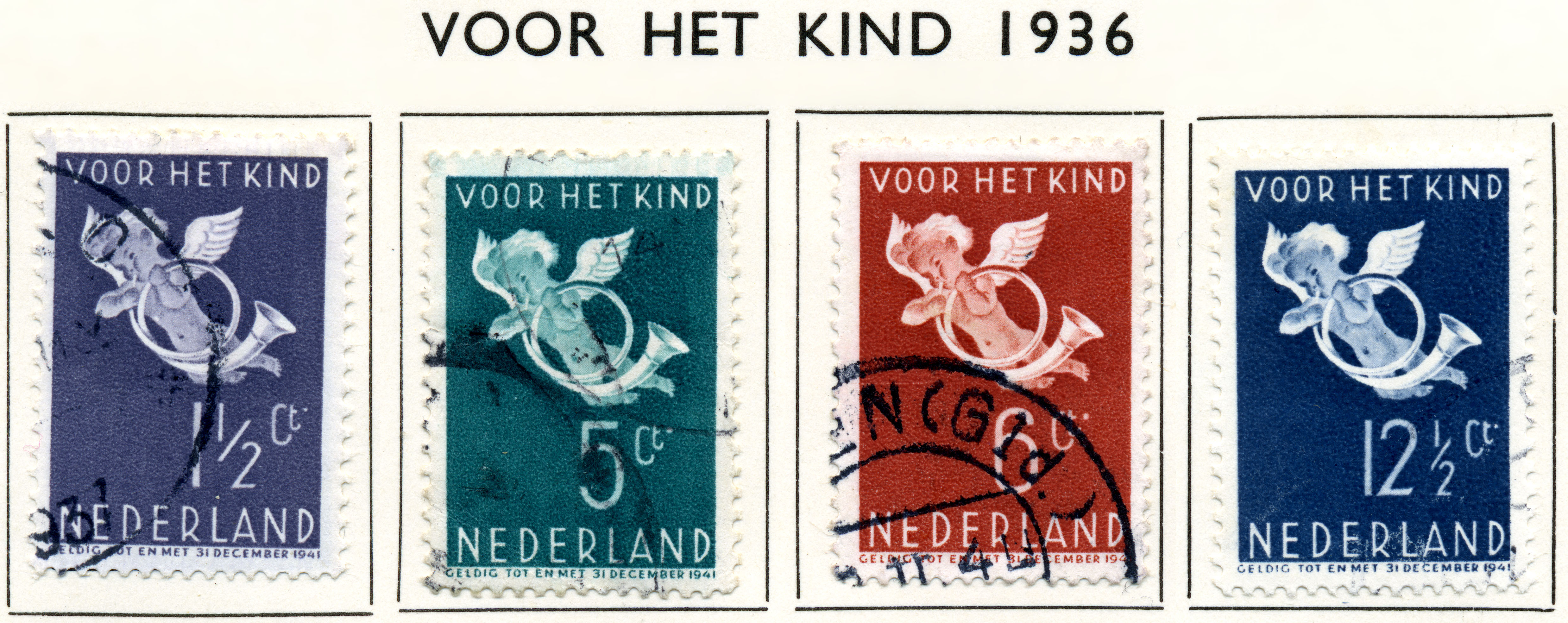 Kinderzegels (1936). Bazuinengel. NVPH nr 289-292. In feite een engel die blaast op een posthoorn Ontwerp van J.S. Sjollema.